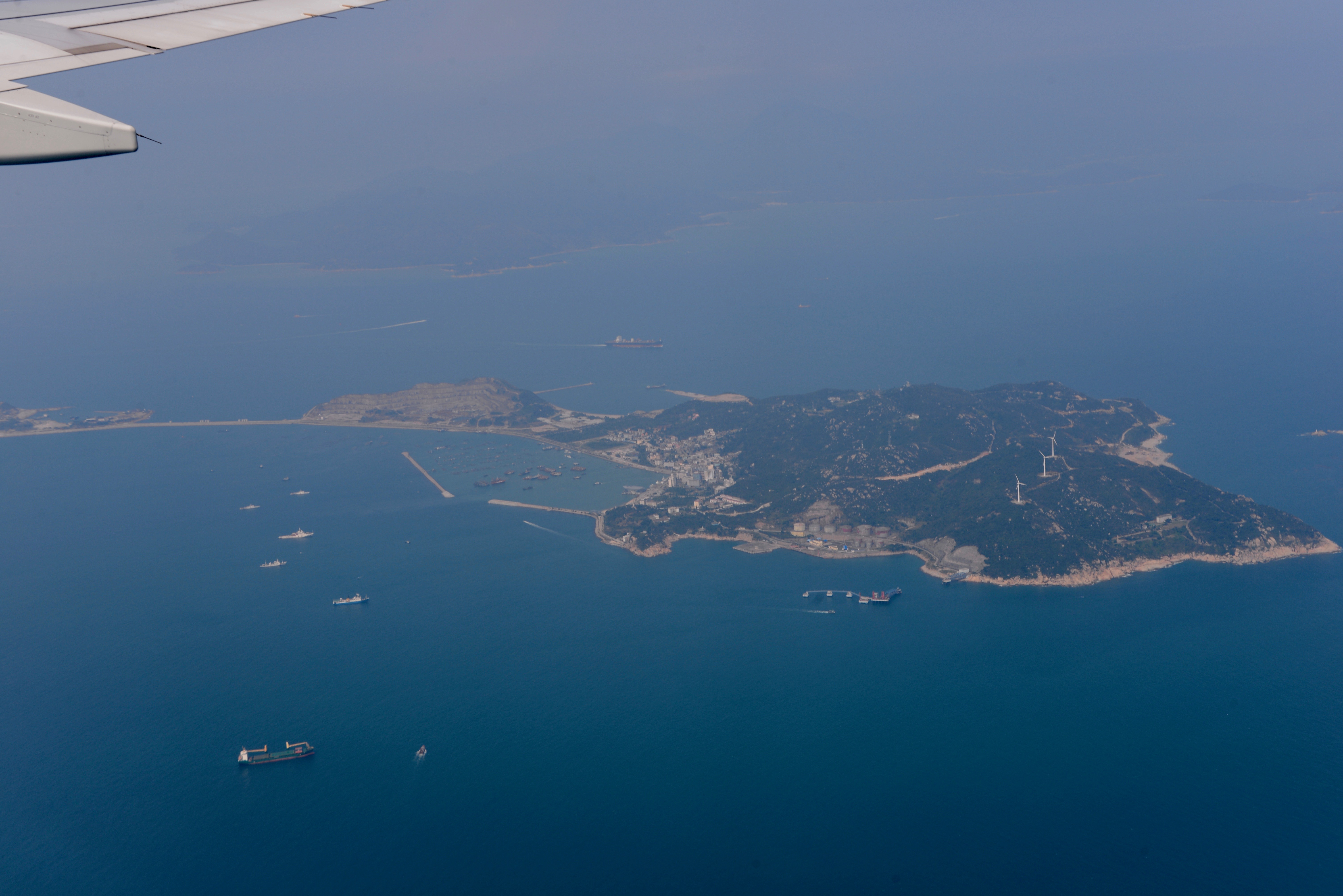 珠海市香洲區桂山島